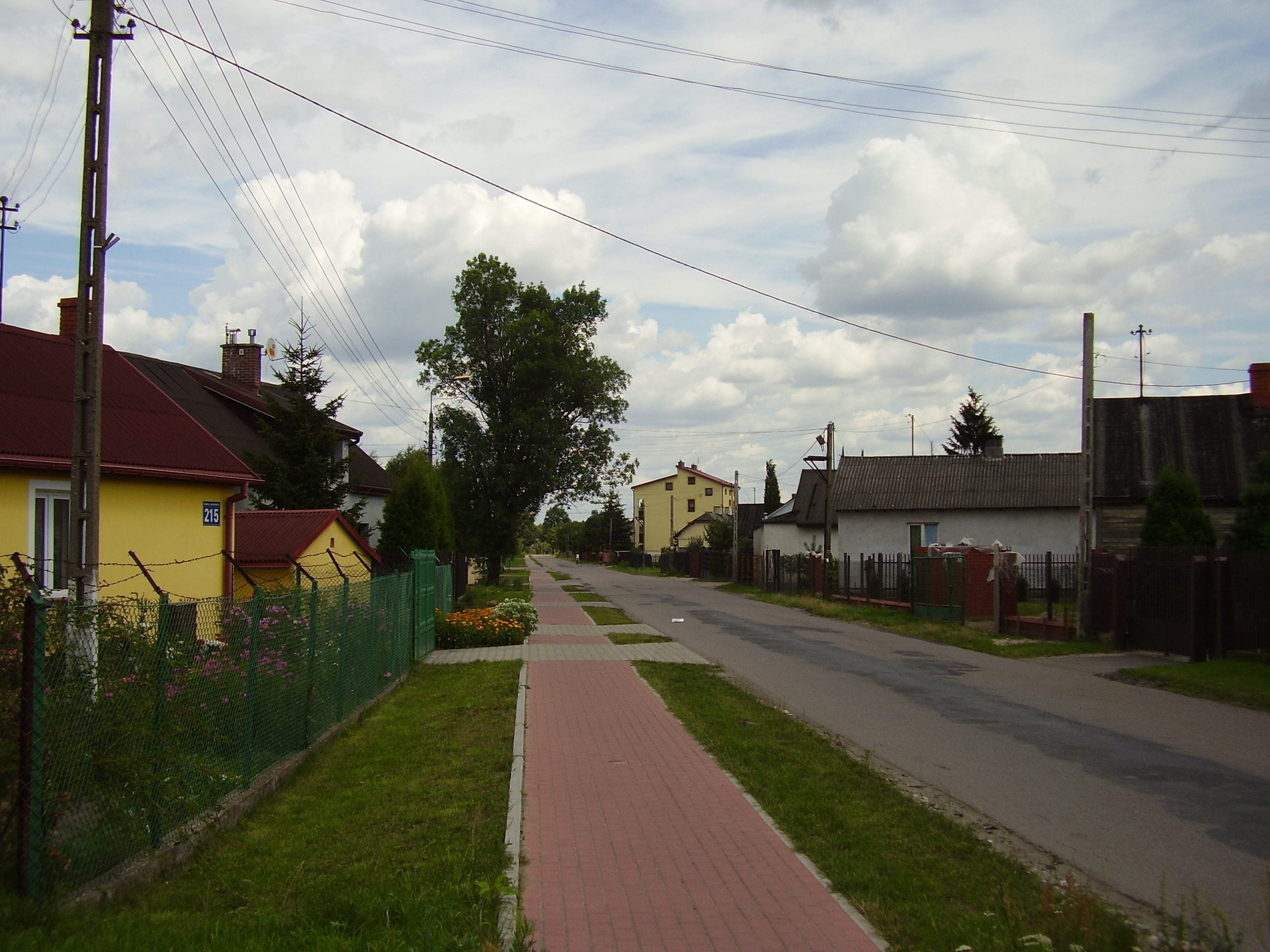 Ulica Materewicza we wsi Ossów